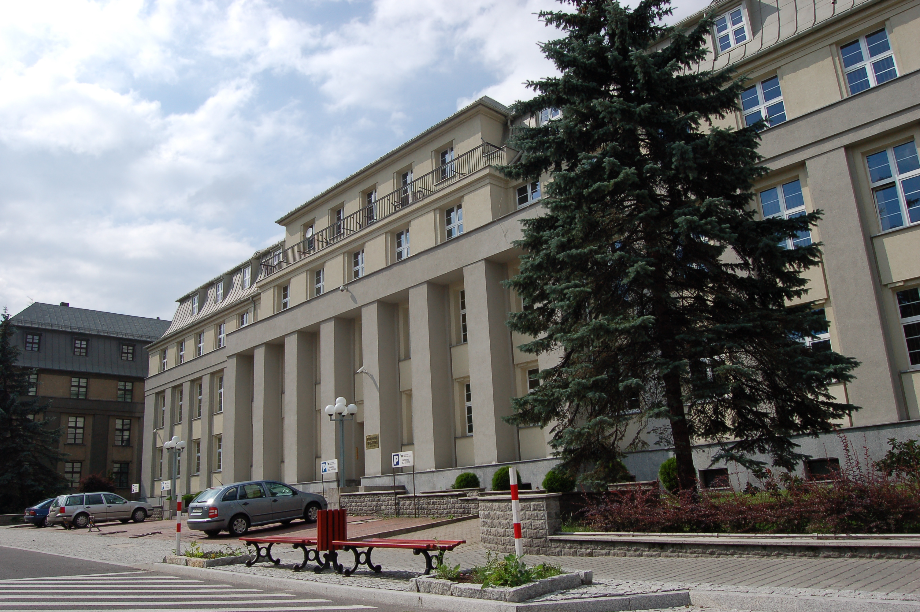 Katowice ul. Powstańców. Budynek Kompanii Węglowej